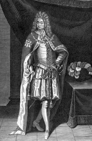 (* 1. August 1629 in Badenweiler (Baden-Durlach); † 24. April 1698 in Hamburg) war ein deutsch-dänischer Politiker, Träger des Dannebrogordens und Landdrost (Landrat) der Herrschaft Pinneberg. Er war der Stammvater des Adelsgeschlechts „Biermann von Ehrenschild“.